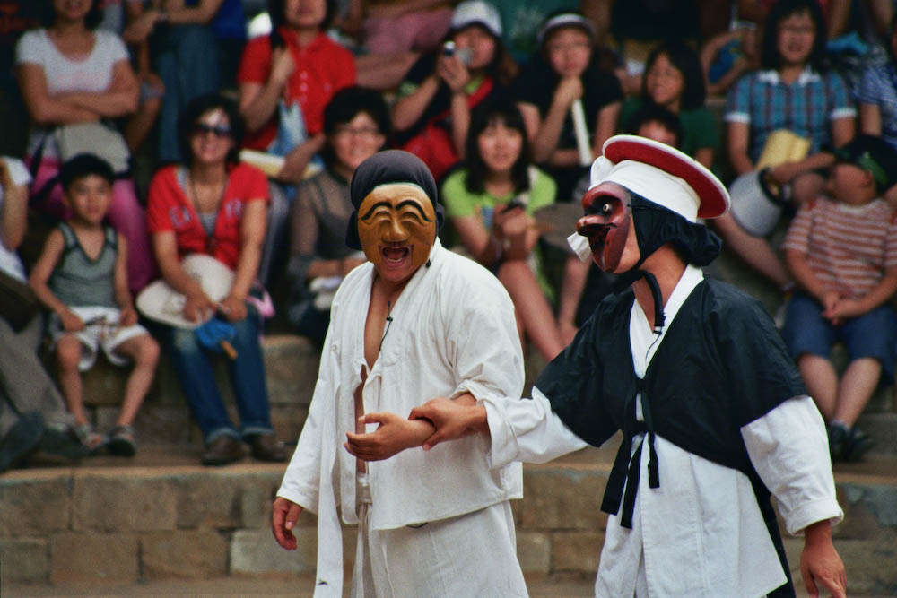 Hahoe Folk Village Mask Dance